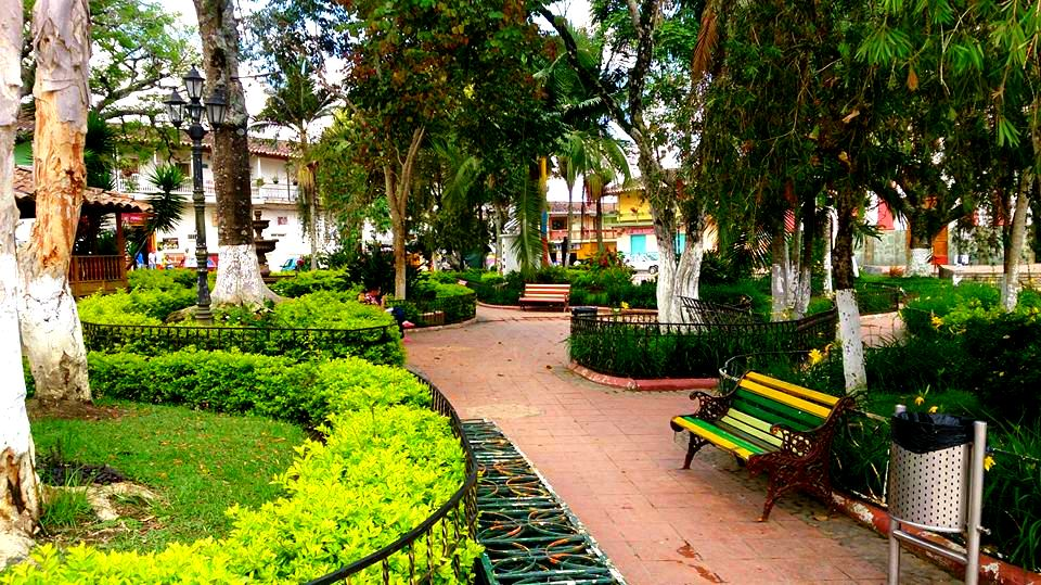 Esta fotografía fue tomada en el municipio colombiano con código 05150.